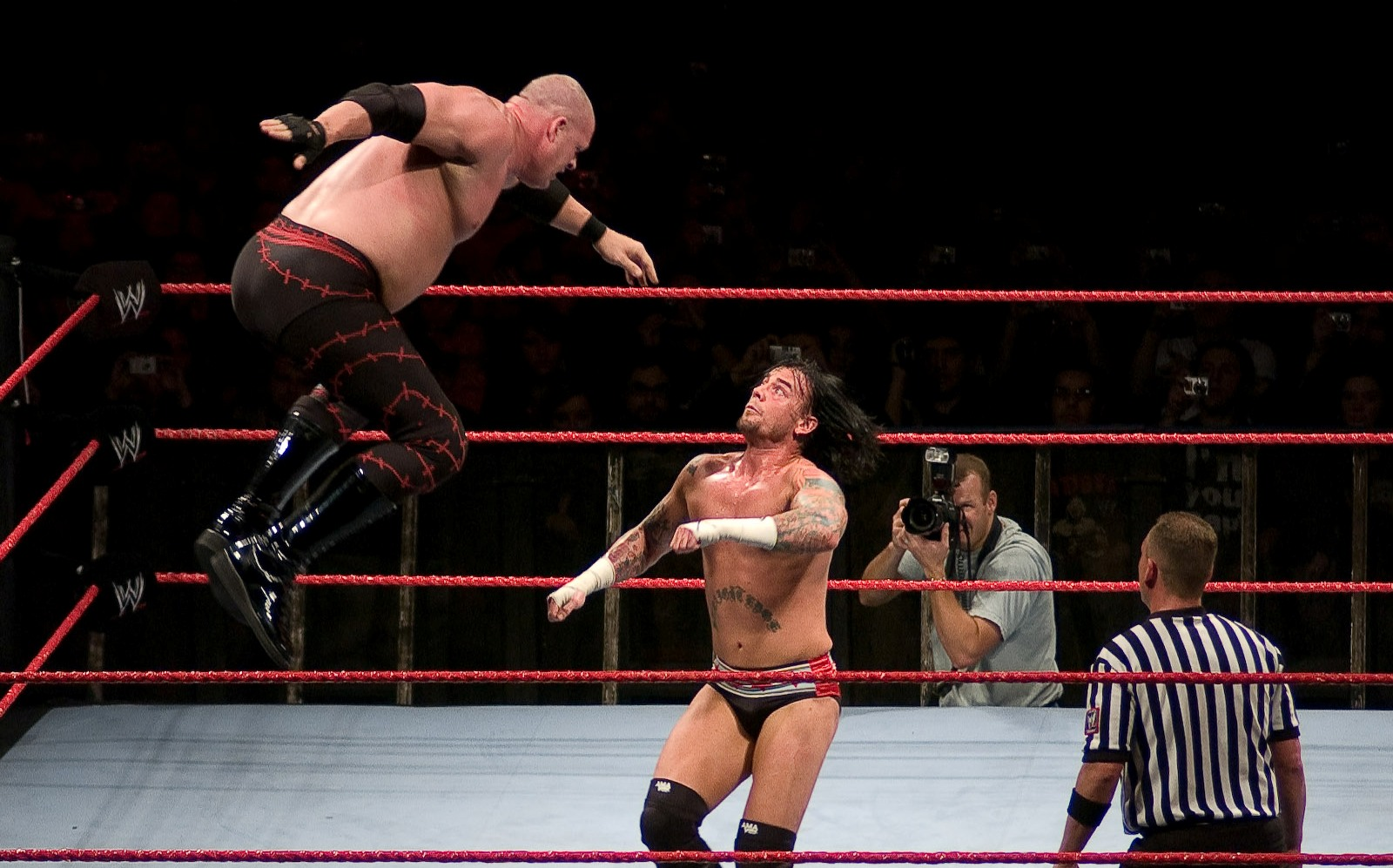 Presentación de la WWE en Santiago de Chile... al más puro estilo "Titanes del Ring" Foto: Alvaro Pruneda No use esta foto sin mi autorización. Don´t use this photo without my permission.